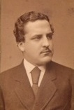 Scan eines alten Familienporträts von Albert Joseph Marie von Grand Ry (1848-1902), letzter Besitzer der Familie von Schloss Lontzen